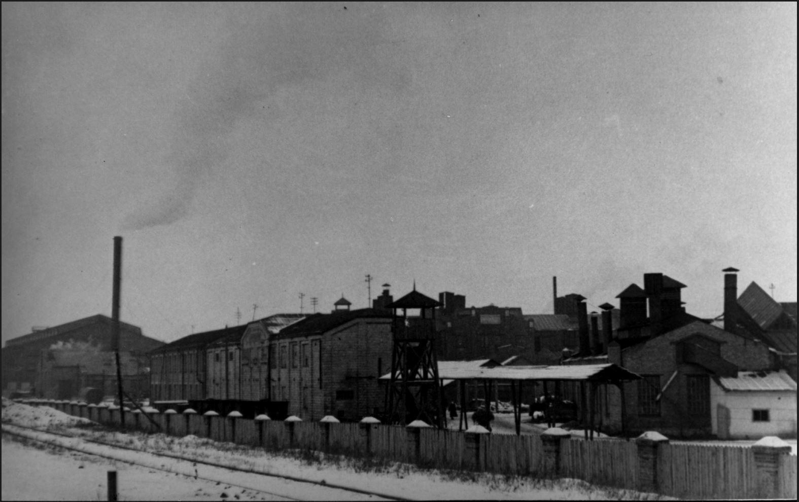 Беларуская (тарашкевіца): Менск (Miensk), Ляхаўка (Lachaŭka). Завод Элегія